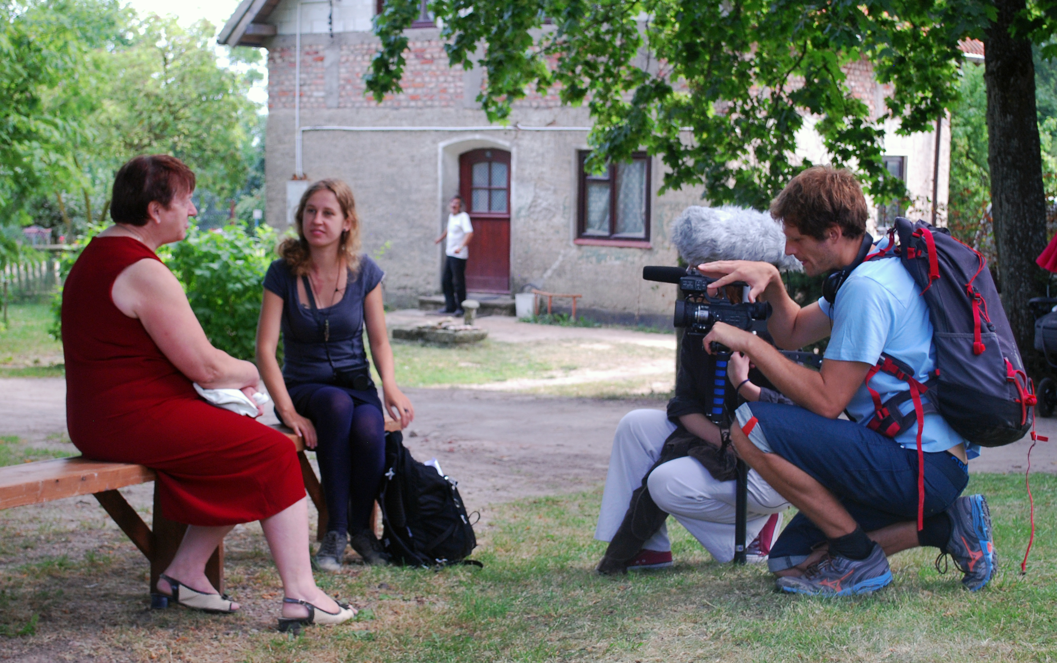 Rok Obrzędowy z Wikipedią - Nowa Wieś Reszelska - wywiad z mieszkanką wsi.